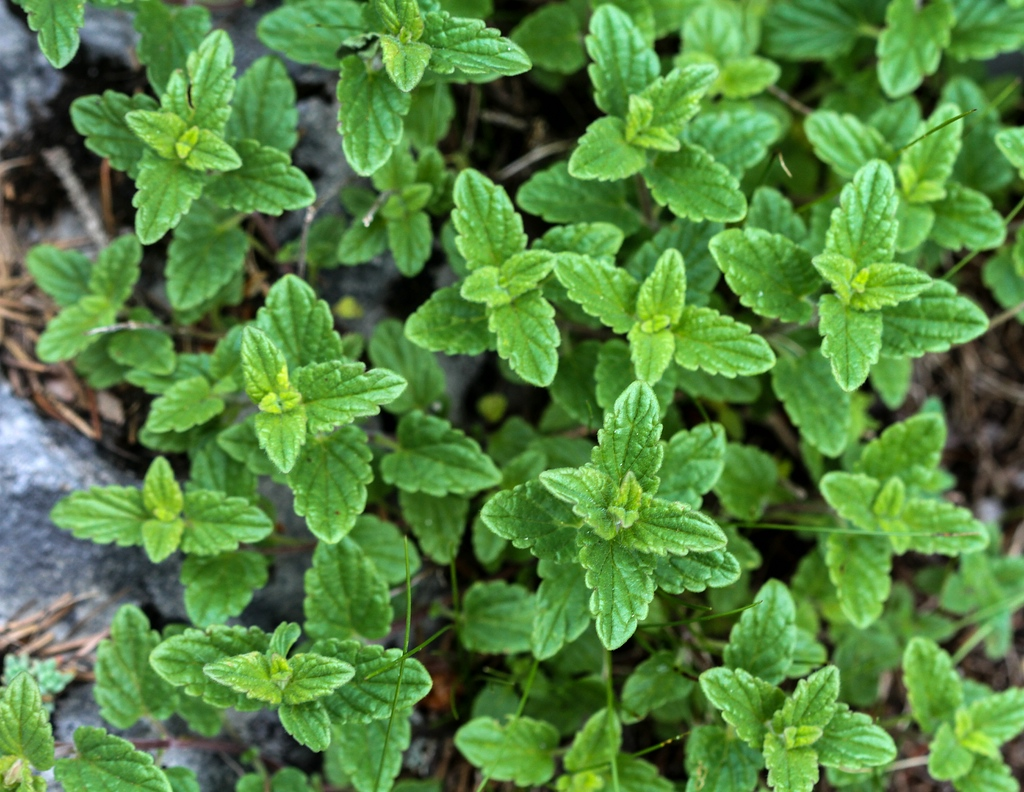 Alpengarten Villacher Alpe: Alpen-Helmkraut